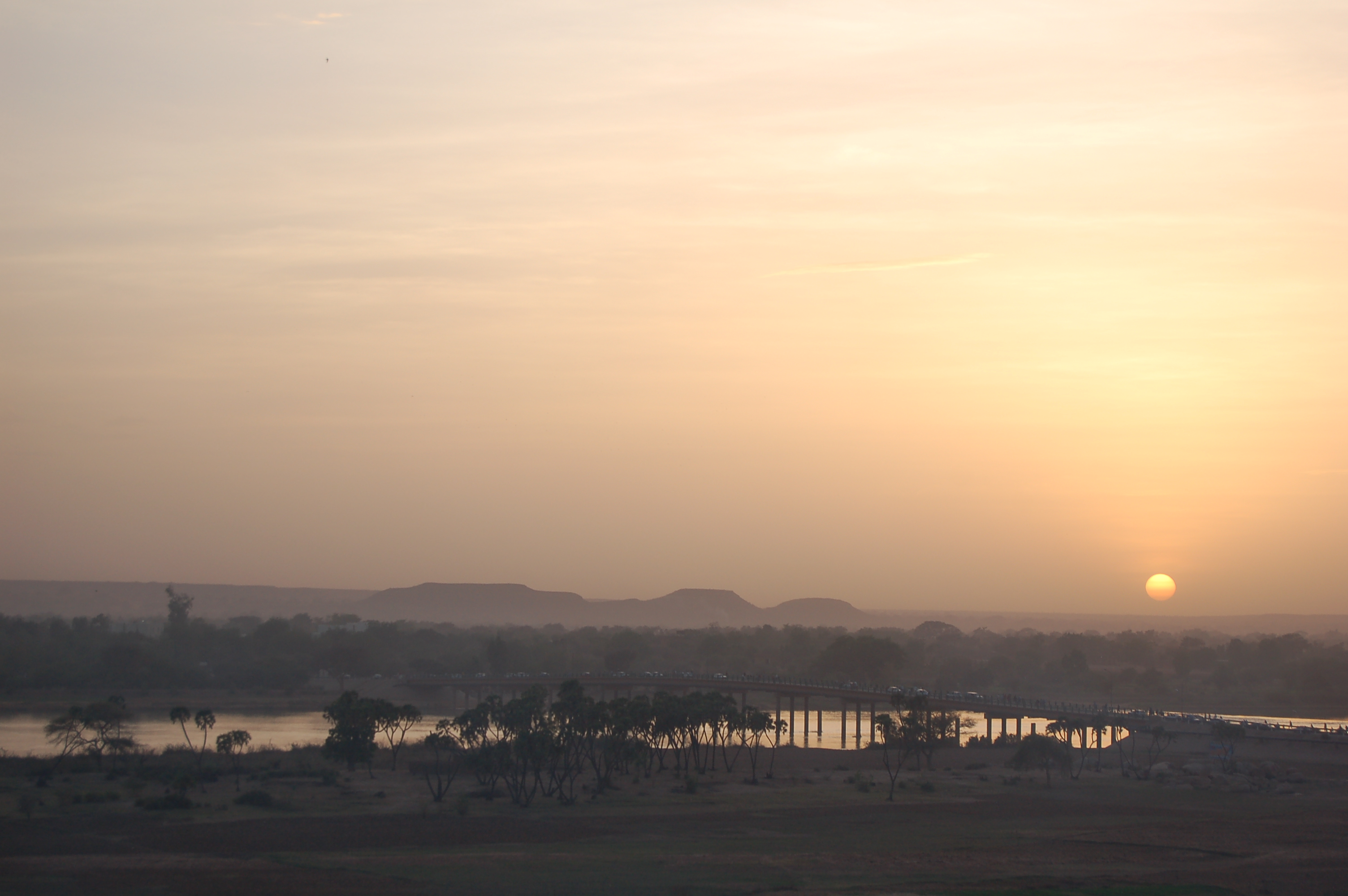 The Niger river in Niamey, Niger.